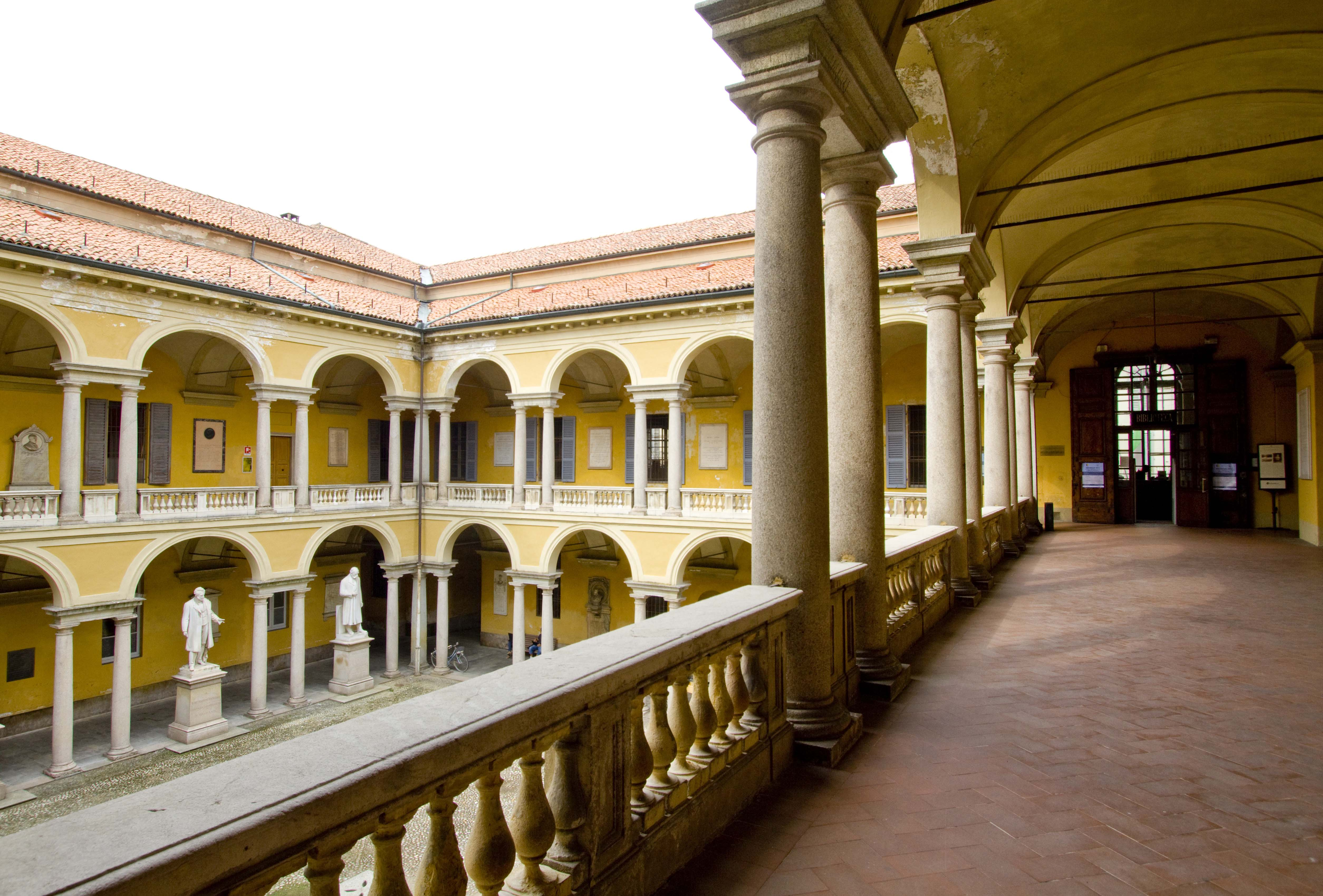 Il "cortile delle statue" posizionato all'ingresso del palazzo centrale